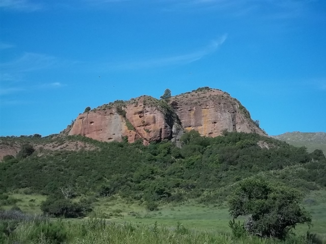 Cerros que contienen las cuevas o grutas de Ongamira, Córdoba, Argentina.